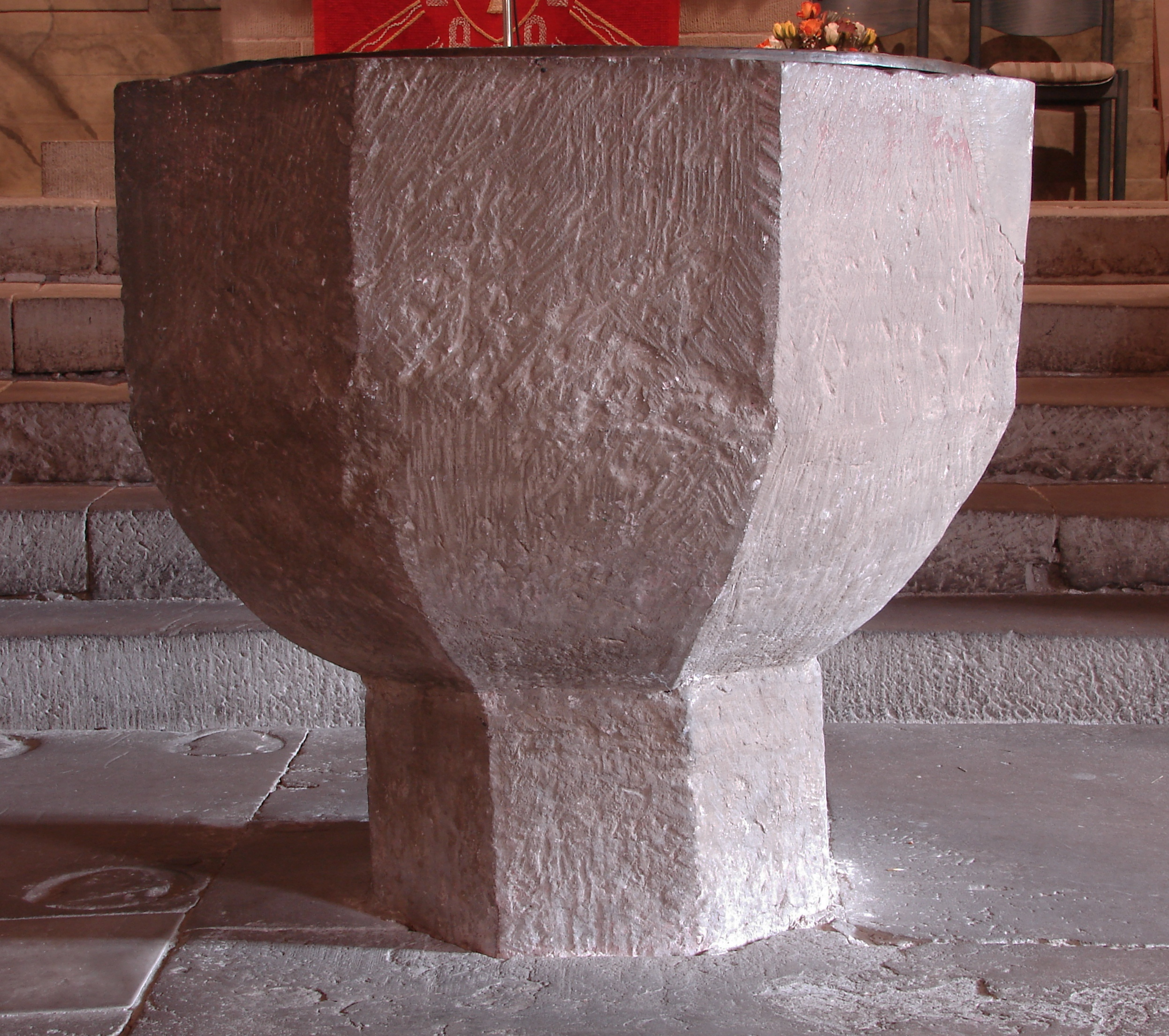 Freiberg am Neckar, Germany, Amandus Church, baptistery